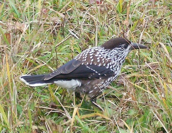 Кедровка